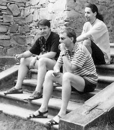 Rozhledna Babylon u Náměšti nad Oslavou - léto 1999